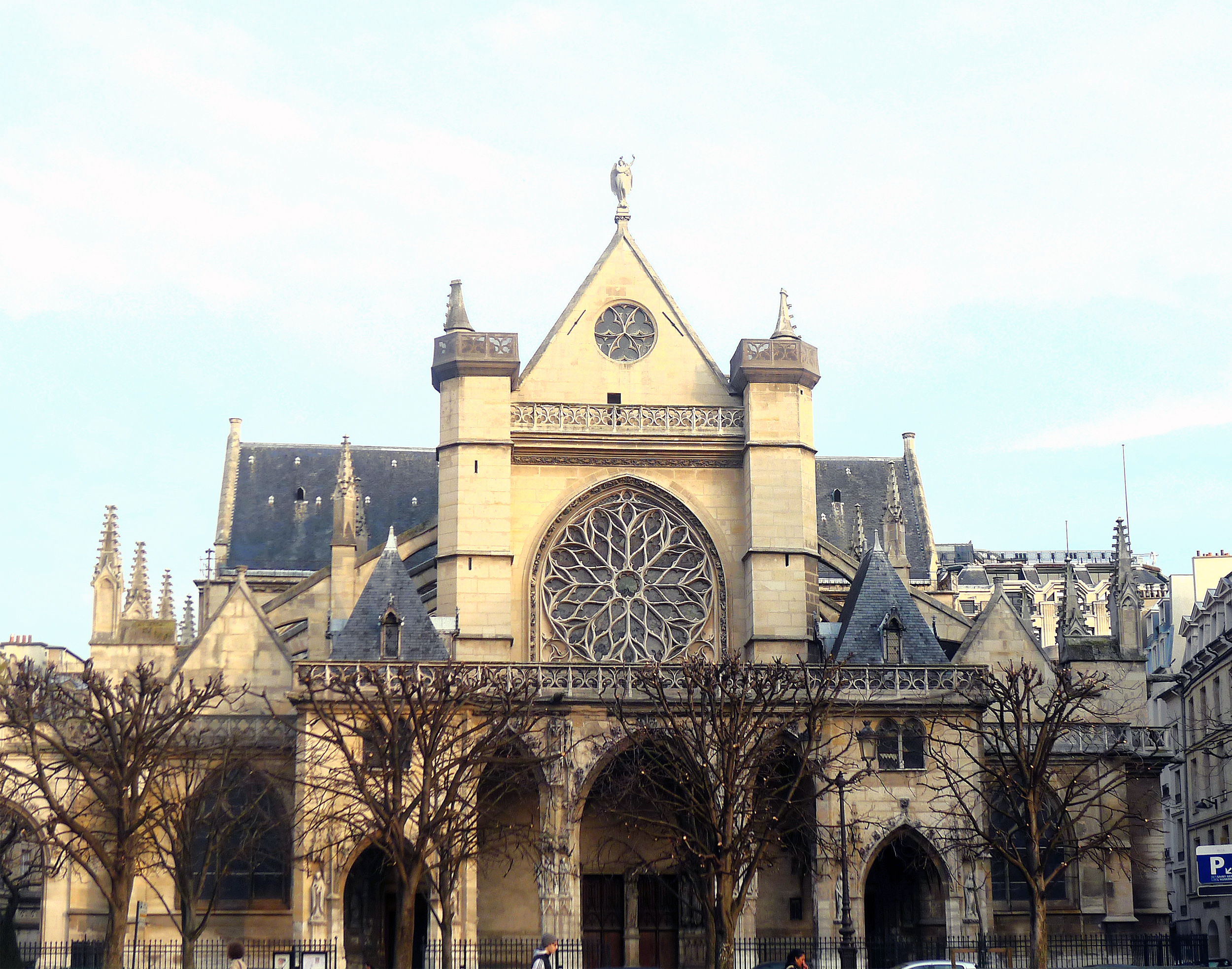 Église Saint-Germain-l'Auxerrois - Paris Ier